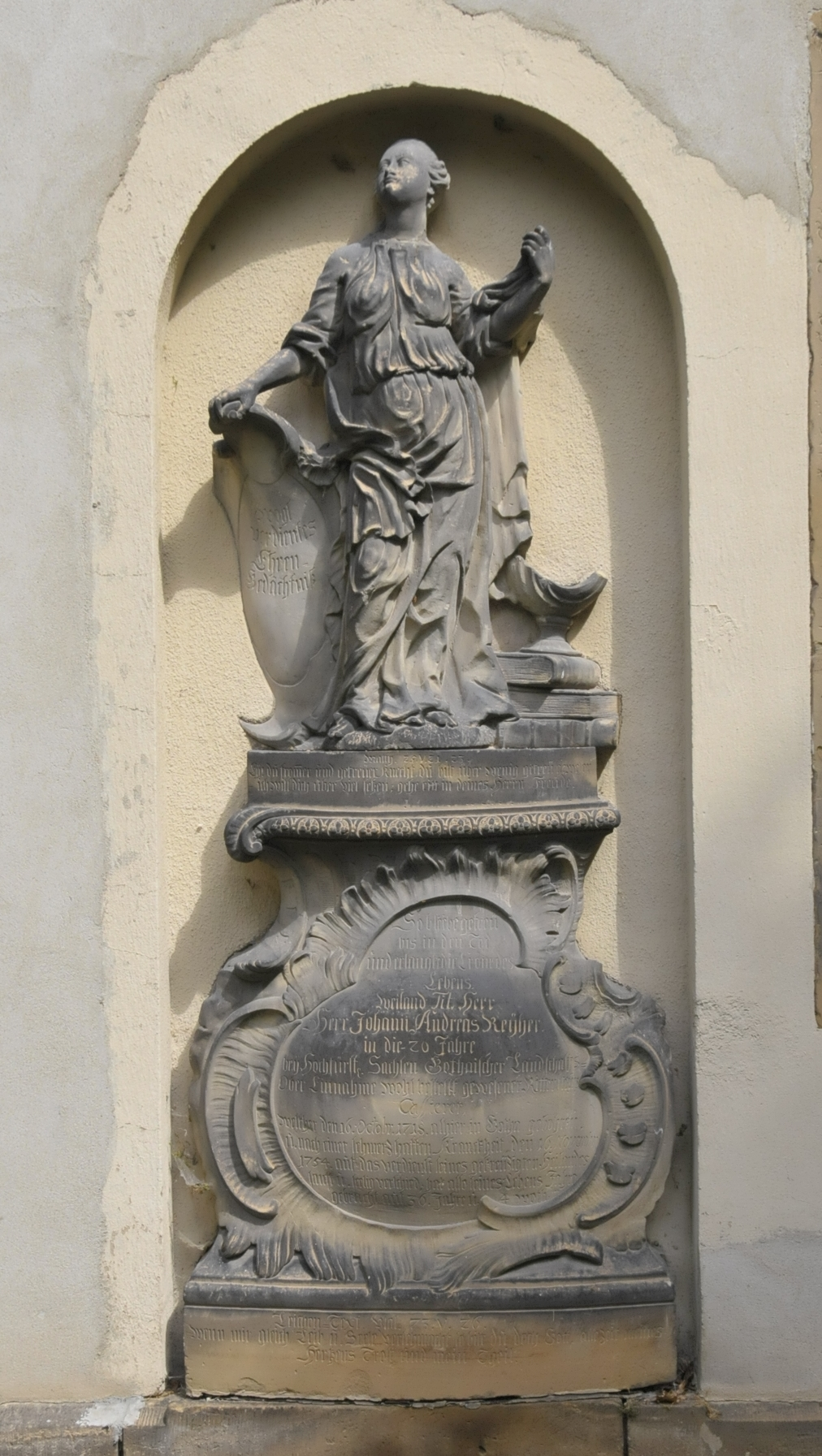 Grabmal für Andreas Reyher auf dem Gothaer Hauptfriedhof